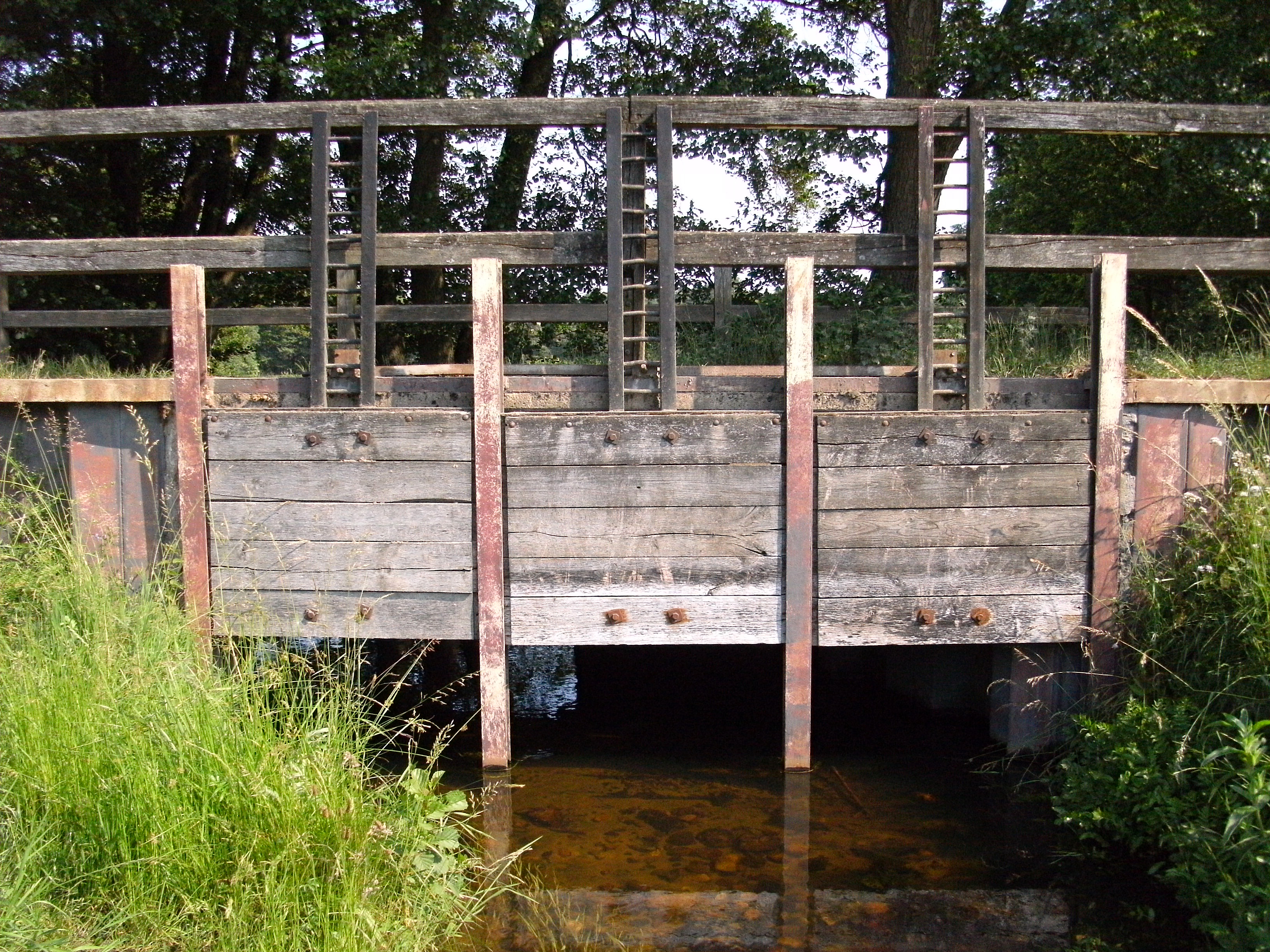 Stauwehr einer ehemaligen Rieselwiese bei Döhle; befestigt an der Brücke über die Schmale Aue